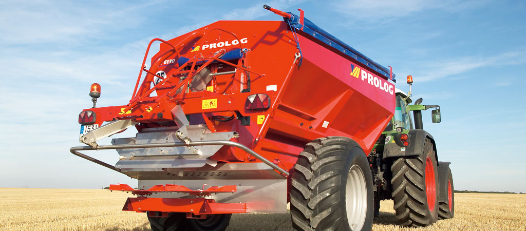 Epandeur CNX 6130